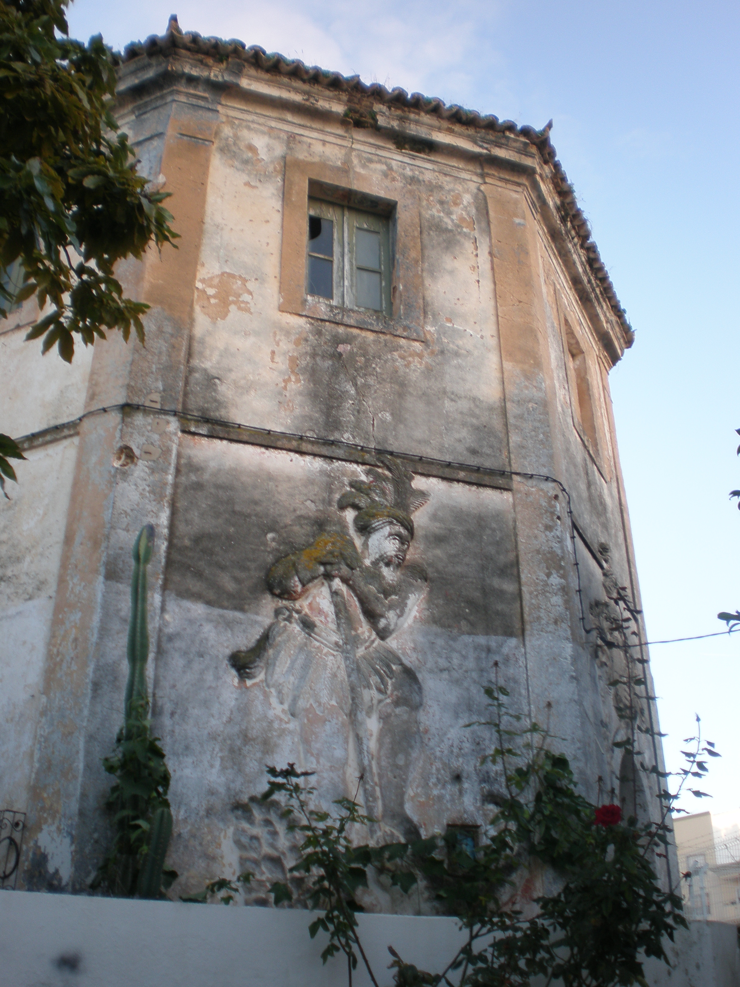 Celeiro de São Francisco ou Torre da Horta dos Cães, Faro, Portugal